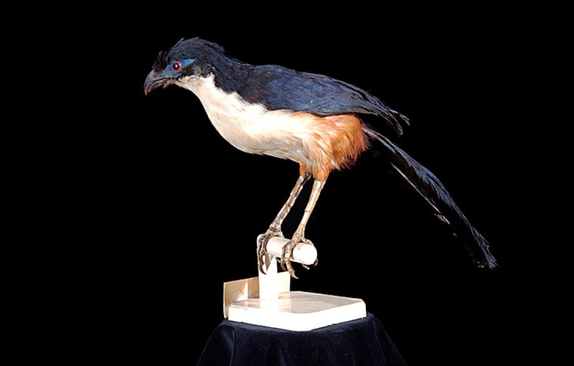 Coua delalandei (Temminck, 1827)